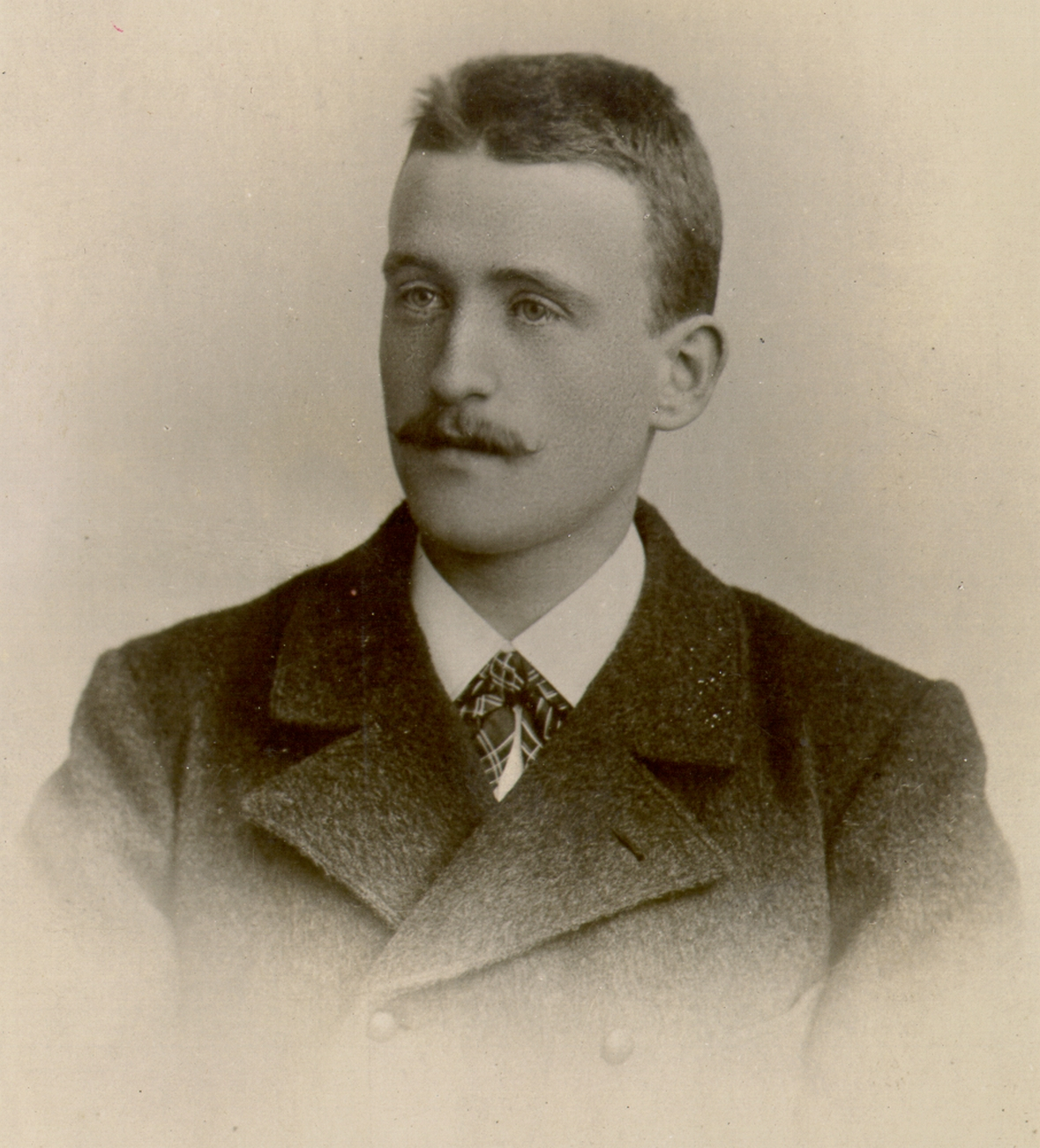 Josip Murn Aleksandrov (1879-1901), Slovene poet.